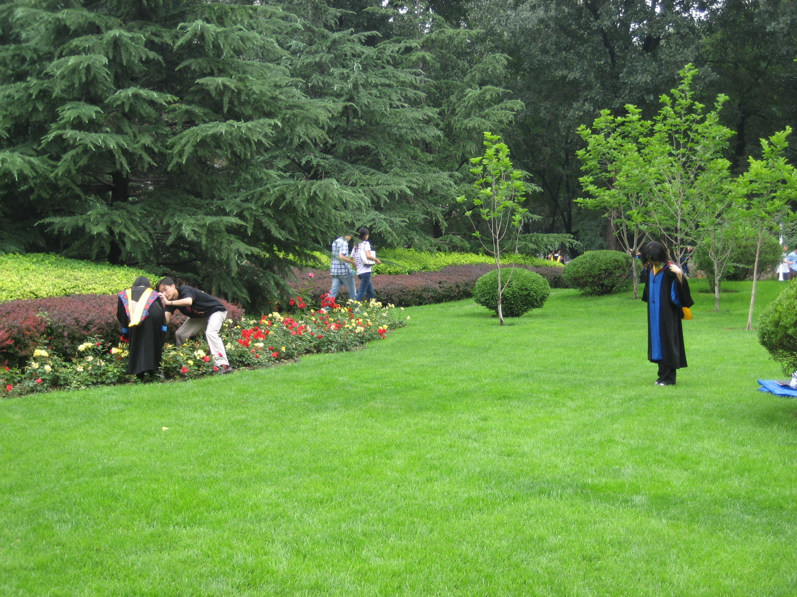 graduate